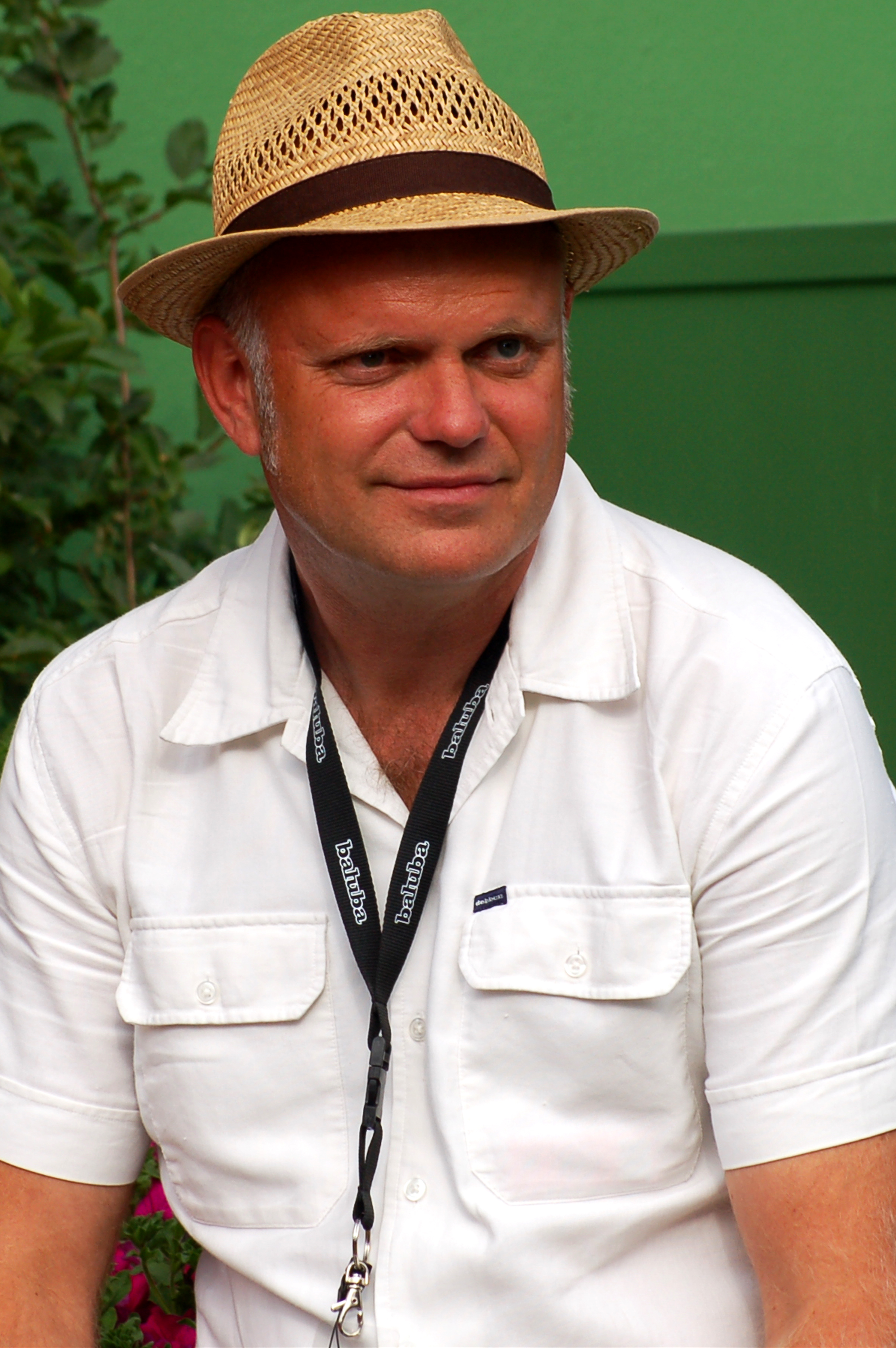 Bosse Rappne på Sommarkrysset 2008